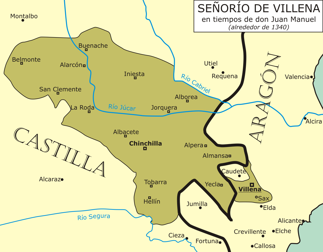 Mapa que muestra las tierras que incluía el señorío de Villena alrededor de 1340, es decir, en la época del célebre escritor Don Juan Manuel (1282-1348), que fue señor de Villena y de otros muchos señoríos y era hijo del infante Manuel de Castilla y nieto del rey Fernando III el Santo.